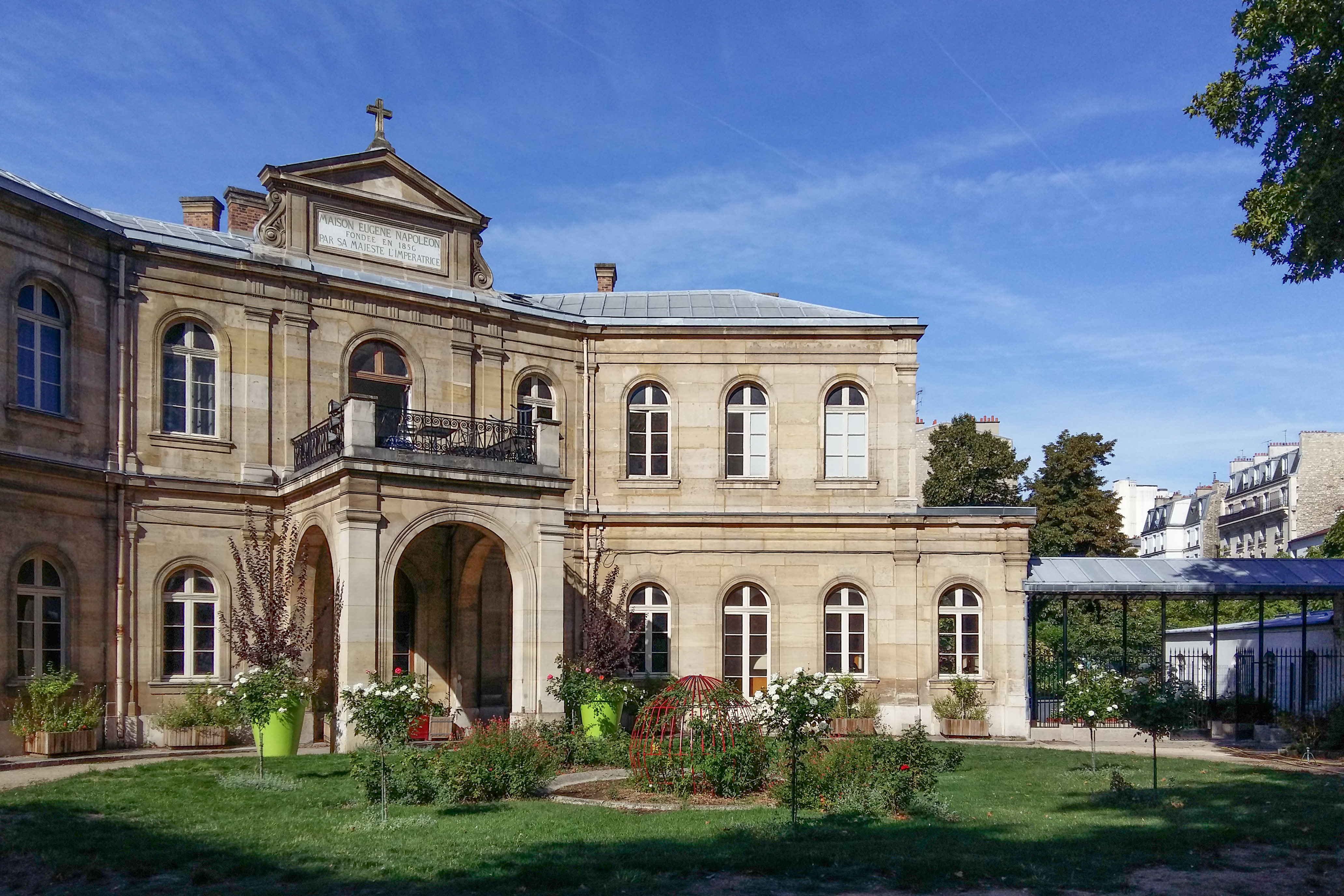 Bâtiments visibles sur le Jardin de la Fondation-Eugène-Napoléon, dans le 12e arrondissement de Paris, France.